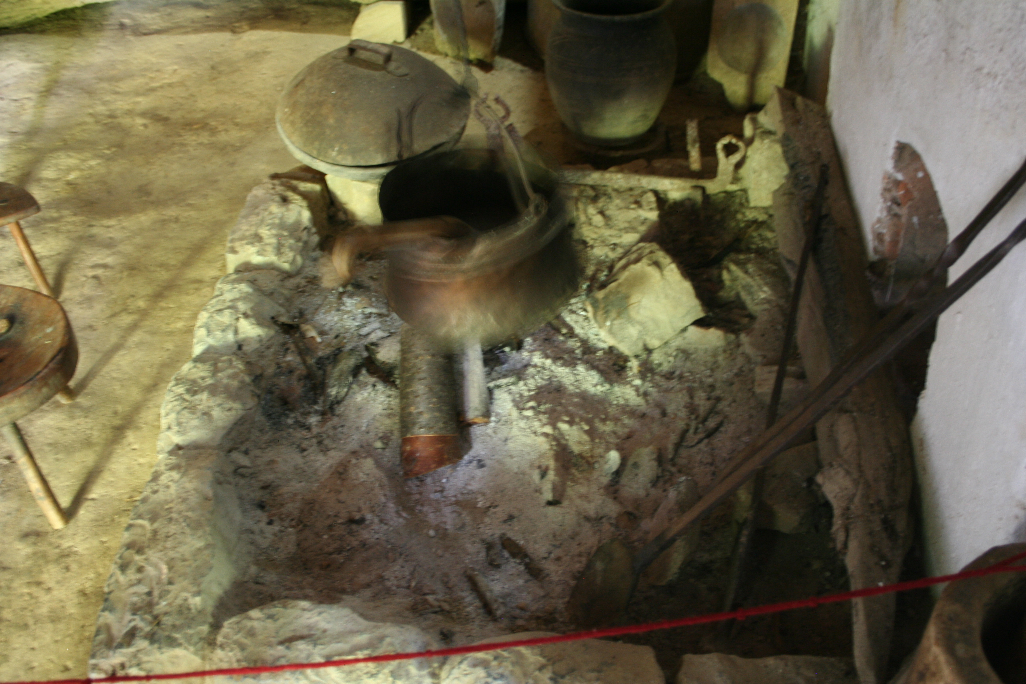 Spomen kuća Vuka Karadžića, Tršić